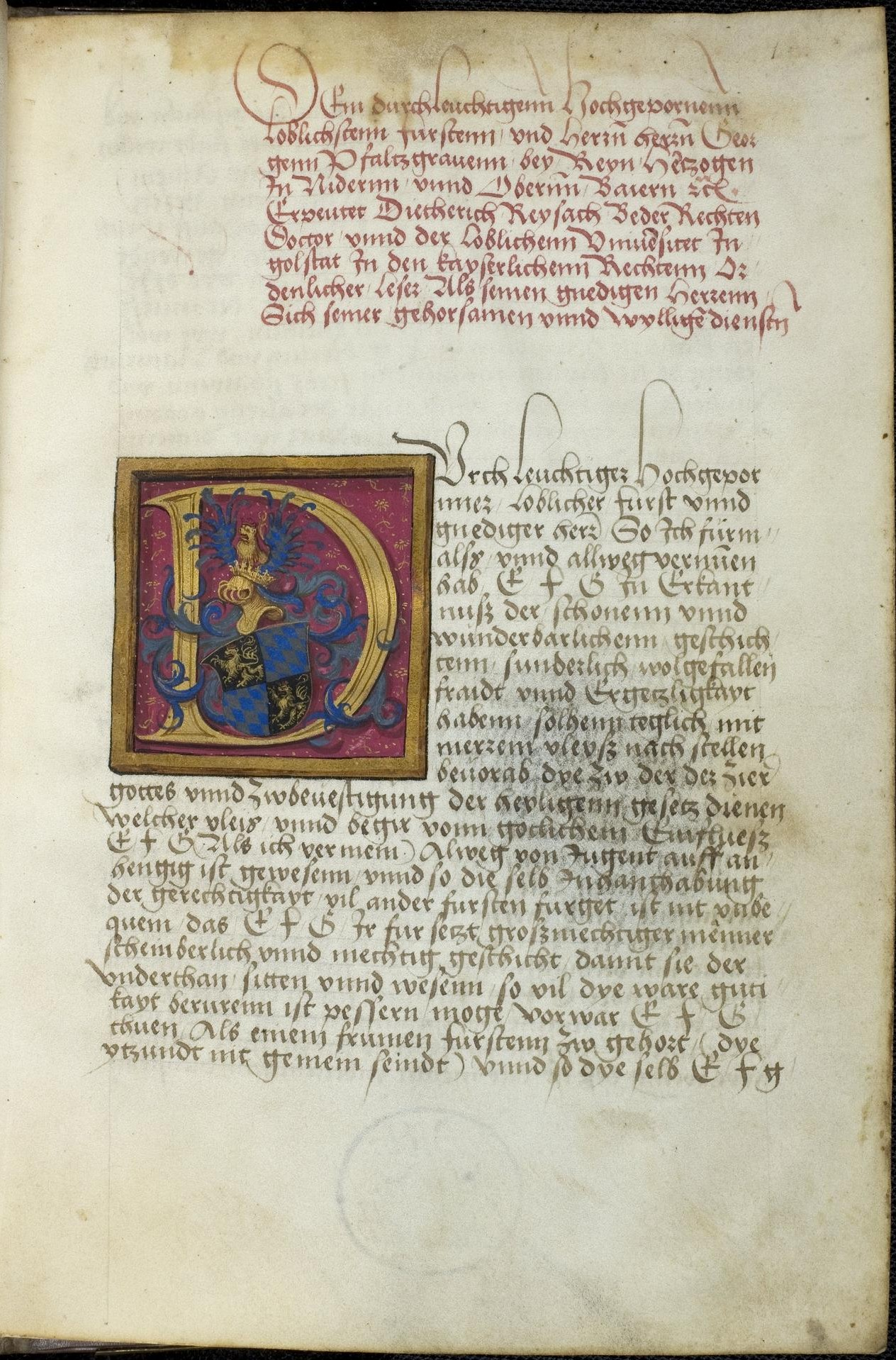 Codex Palatinus germanicus 10, Blatt 1r - Aristeas: Epistola ad Philocratem, deutsch (erste Textseite)